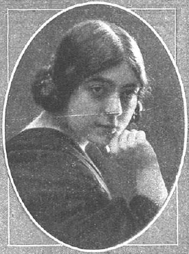 Fotografía de la escritora y pianista Carmen Montoriol publicada en 1913 con motivo de haber ofrecido un concierto en el Palacio de la Música de Barcelona